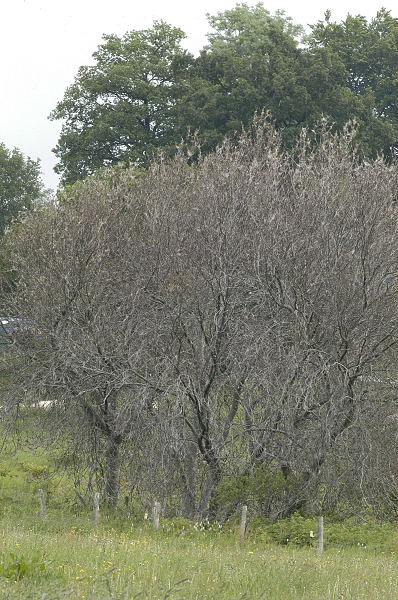 Picture taken in Commanster, Belgian High Ardennes . Species: Yponomeuta evonymella web